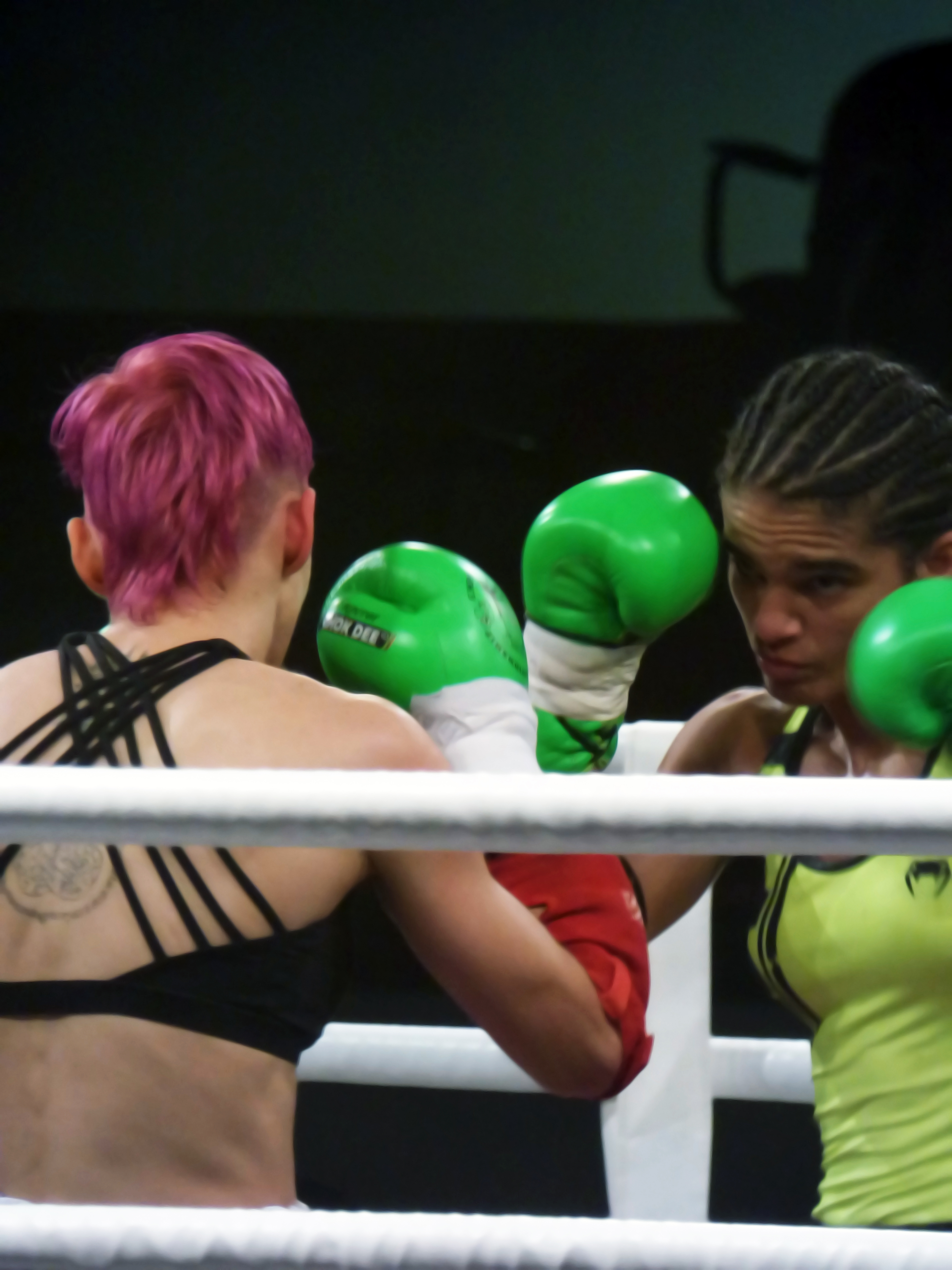 Tournoi boxe thaïlandaise Emperor Chok Dee